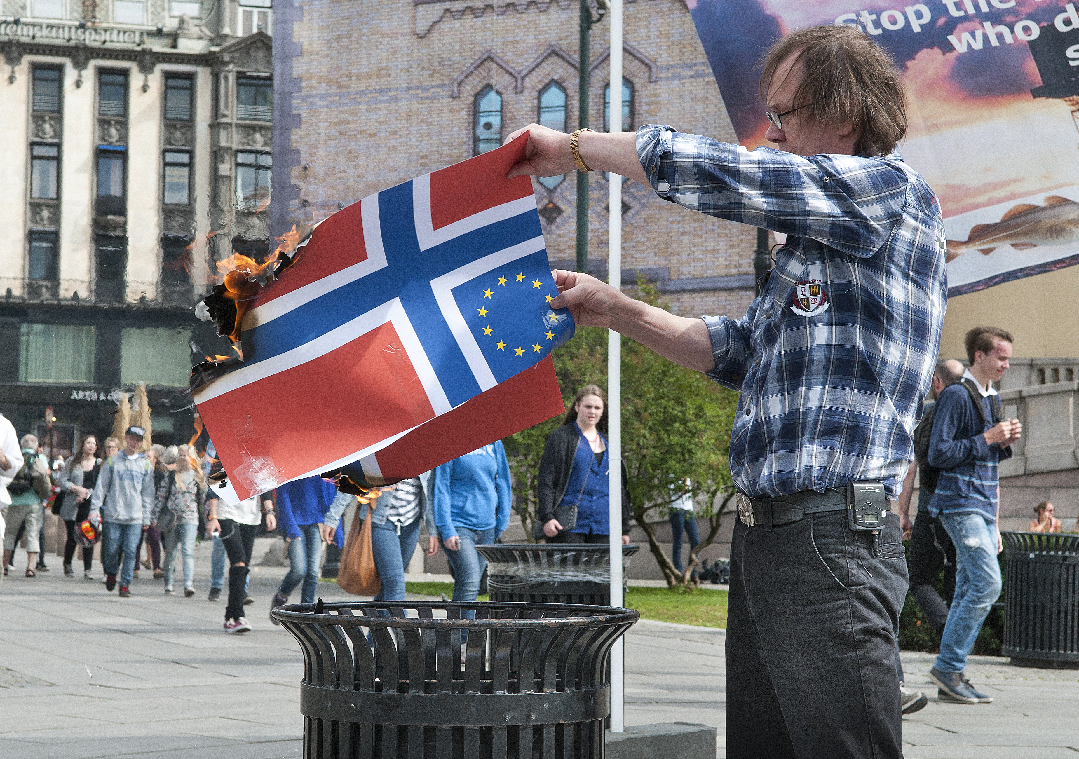 Øystein Meier Johannessen - Aksjon på Eidsvoll Plass foran Stortinget 21 August 2013 mot oljeboring utenfor Lofoten, Vesterålen og Senja. Her brenner han et Hybridflagg (Eu flagget innmontert i det norske).